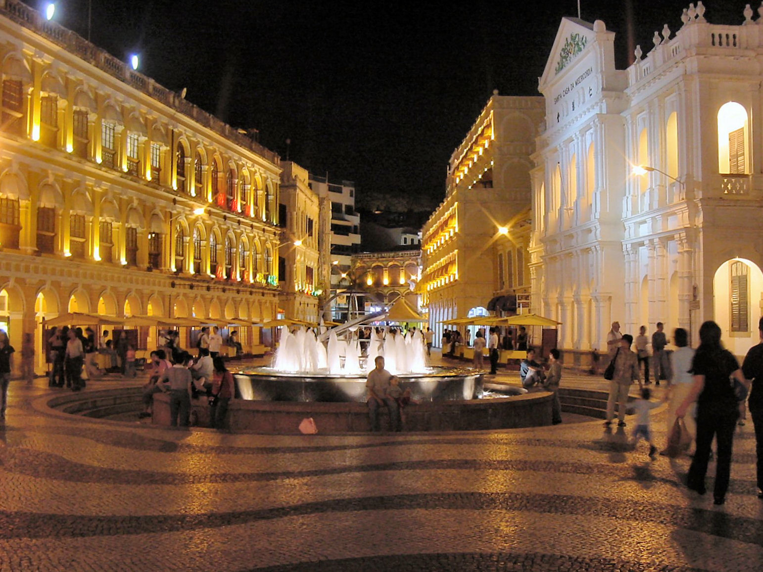 Senátní náměstí v Macau v noci